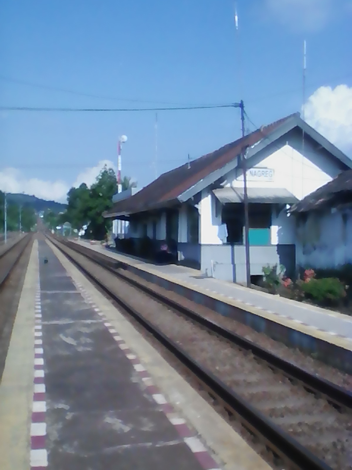 Stasiun Nagreg di sisi barat